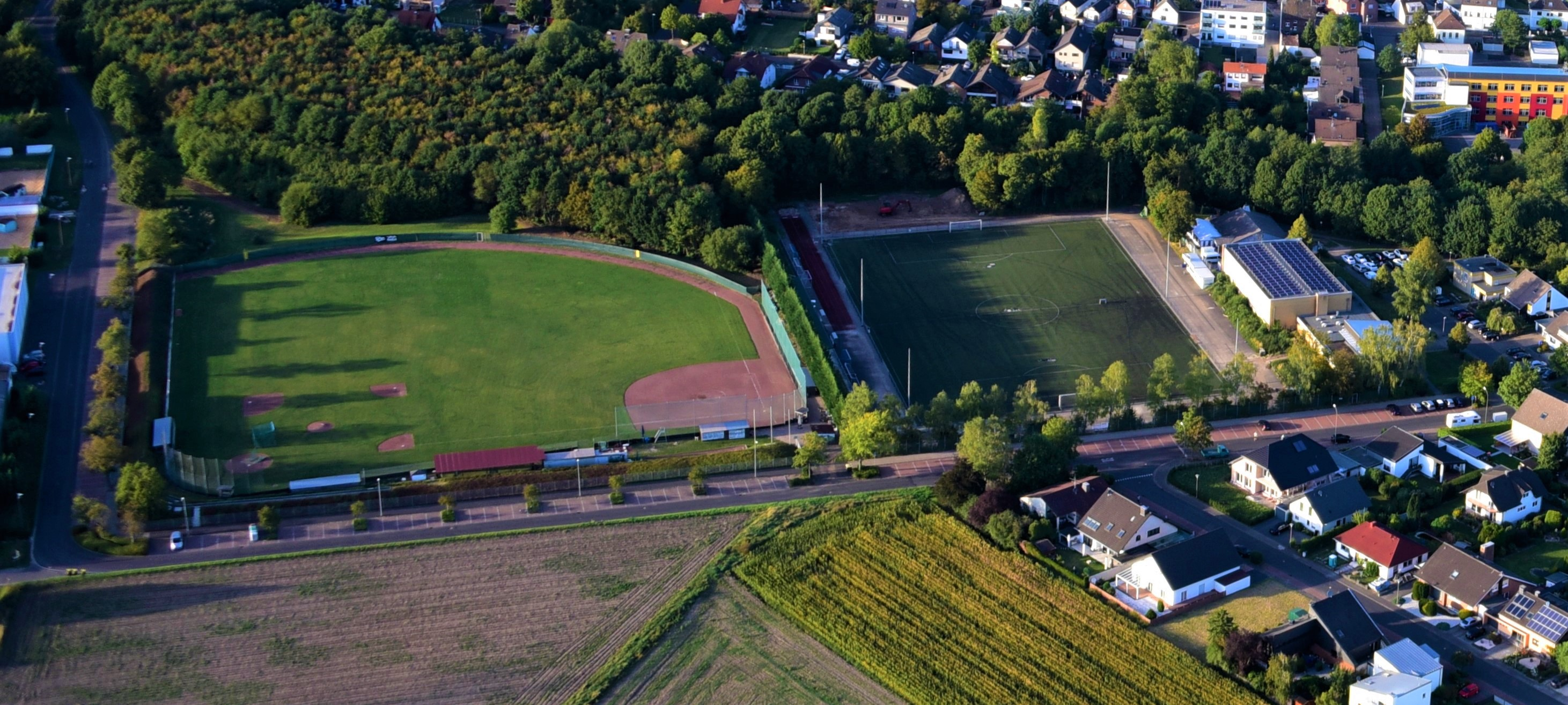 Baseballfeld des Vermins B&SC mit Fußballfeld des SSV Berzdorf im Westen des Wesselinger Stadtteils Berzdorf.